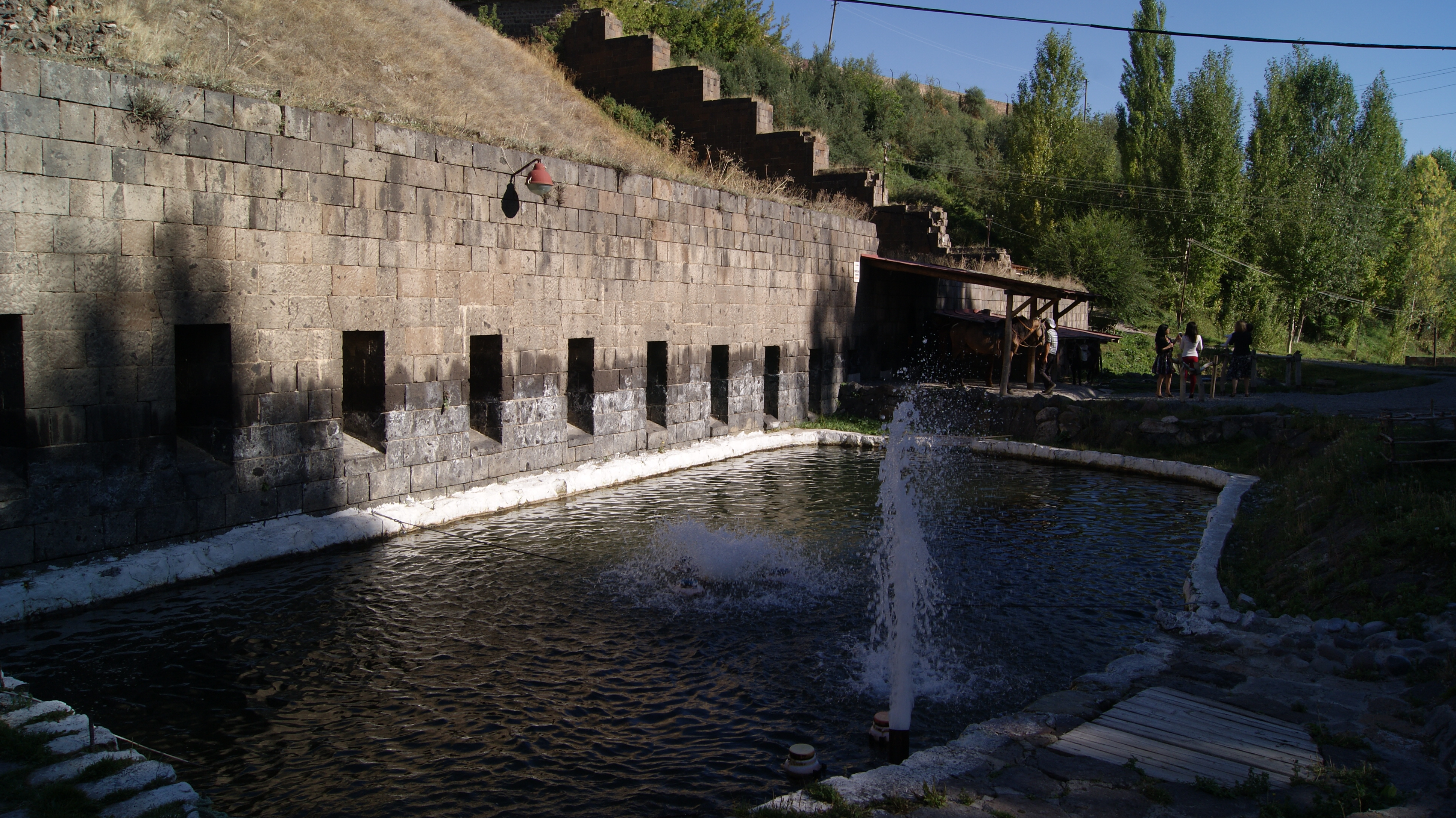 Չերքեզի ձոր 1/5